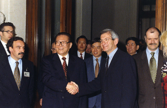 Il Presidente della Camera dei deputati, Luciano Violante, saluta il Presidente della Repubblica Popolare Cinese, Jiang Zemin